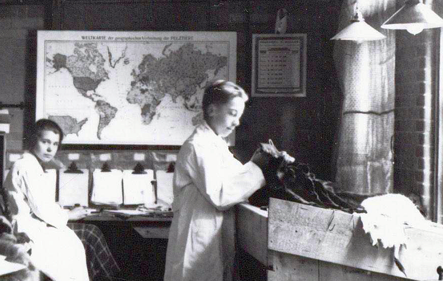 Beschrijving Leidseplein 29 Hirsch & Cie, pelterij. Documenttype foto Vervaardiger Merkelbach, Atelier J. Collectie Collectie Atelier J. Merkelbach Geografische naam Leidseplein Inventarissen Afbeeldingsbestand B00000002688 Generated with Dememorixer